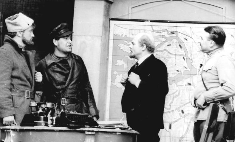 Gera, Szene der Dorftheatergruppe Ebersdorf Zentralbild Liebers 10.7.70 Gera: Dorftheater Ebersdorf spielt "Der Mann mit dem Gewehr"- In einer Szene des Schauspiels "Apotheker Dr. Rudolf Laufke als "Lenin", Schlosser Ralf Töpfer als "Arbeiter" (2.v.l.) und der Lehrer Roland Mösch als "Iwan Schadrin" (l.). Mit diesem Stück von Nikolai Pogodin, das vom Dorftheater Ebersdorf anläßlich des Leninjahrs einstudiert wurde, beteiligte sich das Ensembele an den Arbeiterfestspielen in Rostock. Das 100 Mitglieder zählende Ensemble zeigte seit seiner Gründung im Jahre 1959 15 Inszenierungen. Für seine hervorragenden Leistungen wurde es bisher mit dem Titel "Hervorragendes Volkskunstkollektiv", dem Kunstpreis des Bezirks Gera, dem Staatspreis für künstlerisches Volksschaffen I. Klasse und dem Vaterländischen Verdienstorden in Silber geehrt.